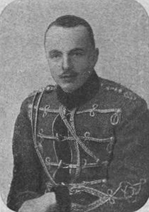 Поручик Михаил Петрович фон-Кауфман, скончавшийся от ран в августе 1914 года.